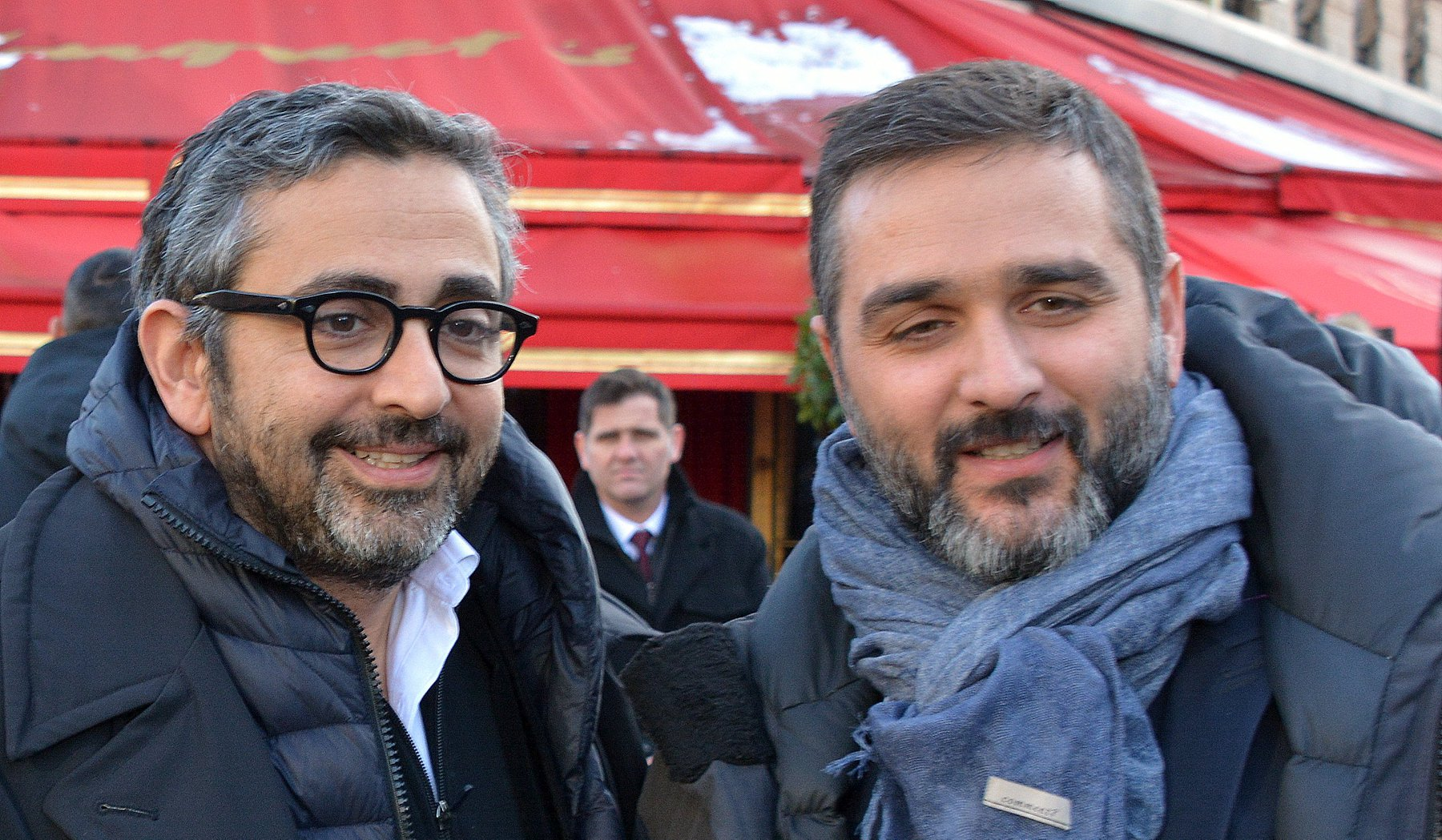 Eric Toledano et Olivier Nakache au déjeuner des nommés des César du cinéma